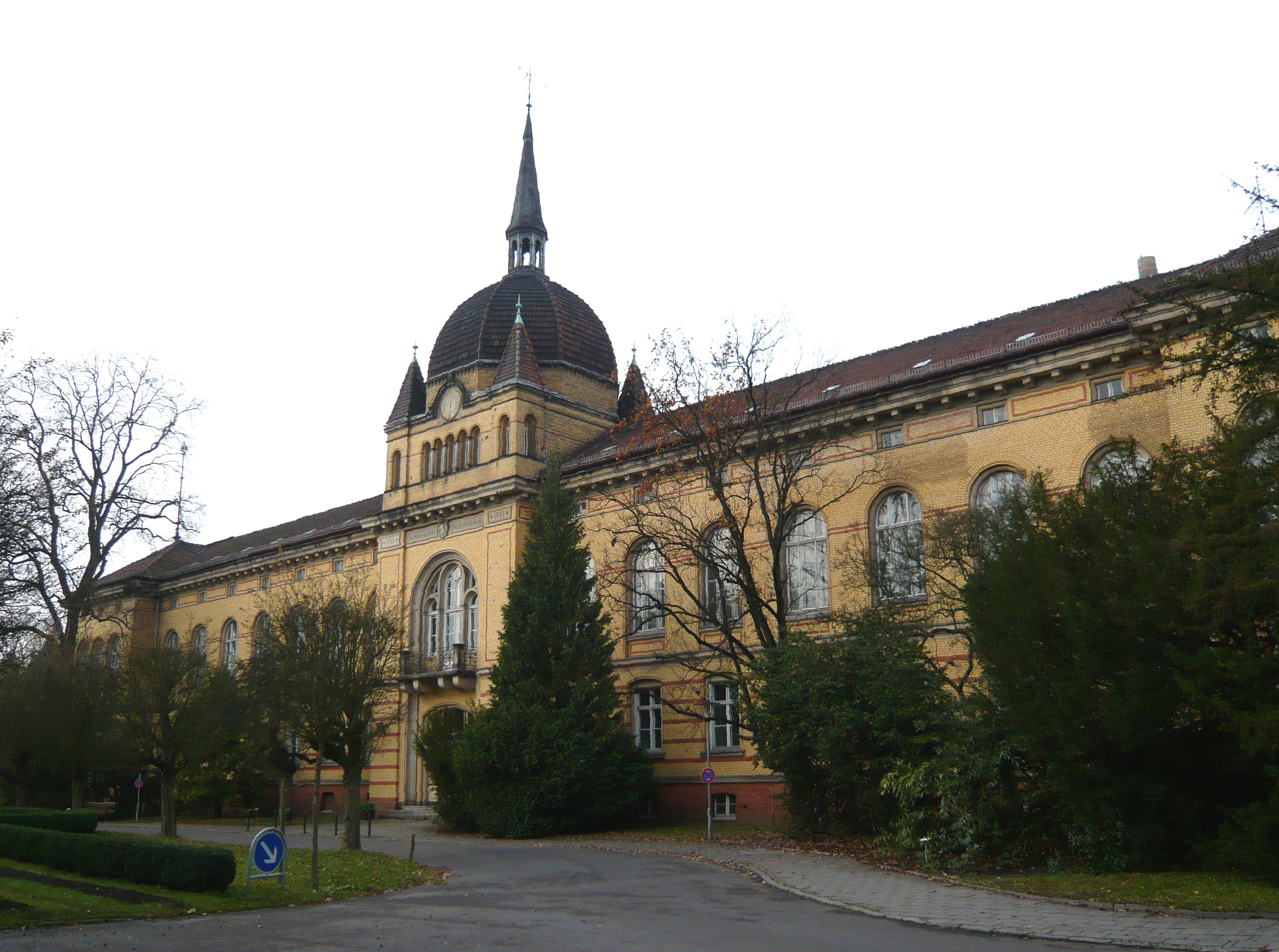 Wilhelm-Griesinger-Krankenhaus, Haupthaus (3)